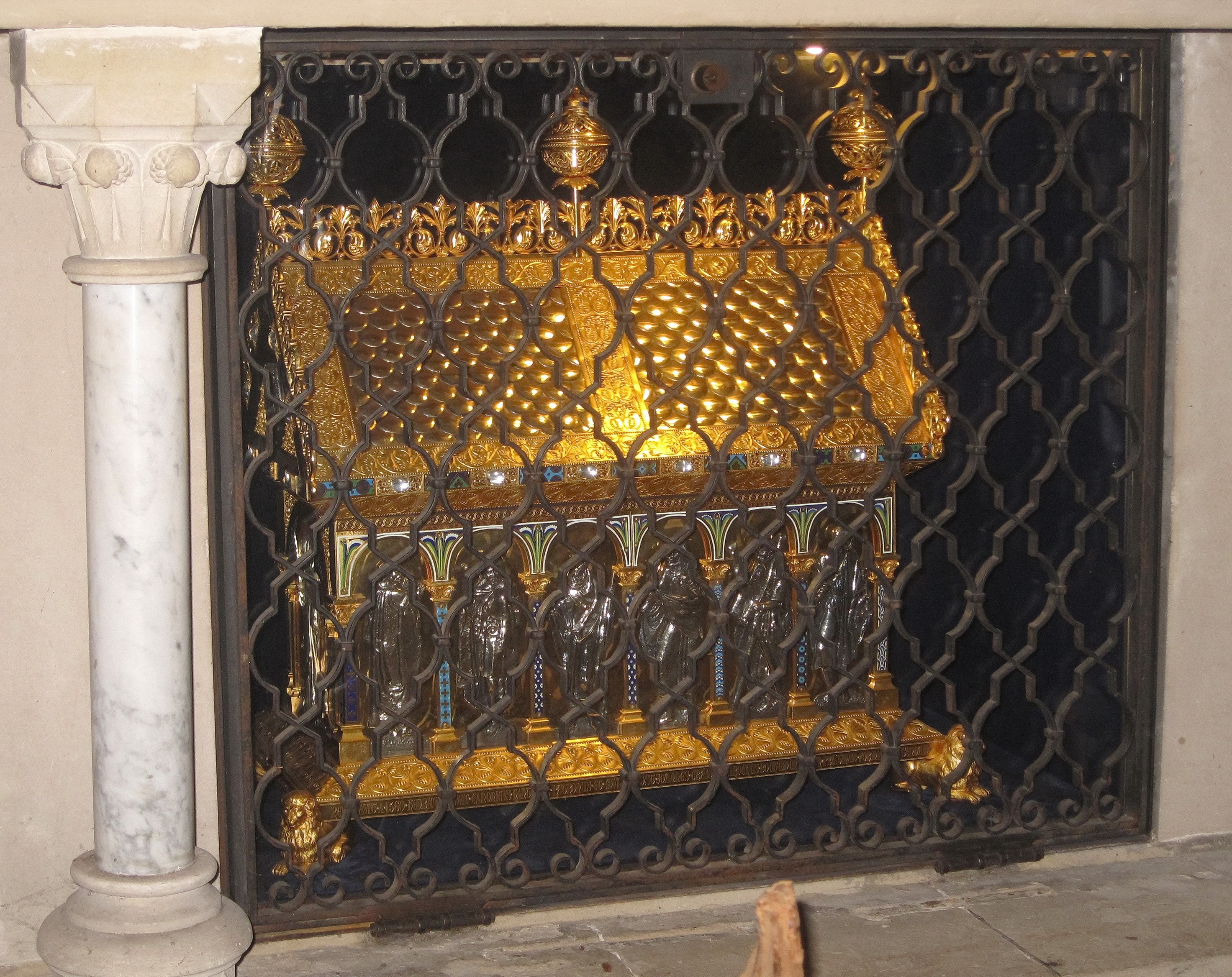 Reliquienschrein unterhalb des Marienaltares in der Propsteikirche St. Peter und Paul, Bochum.